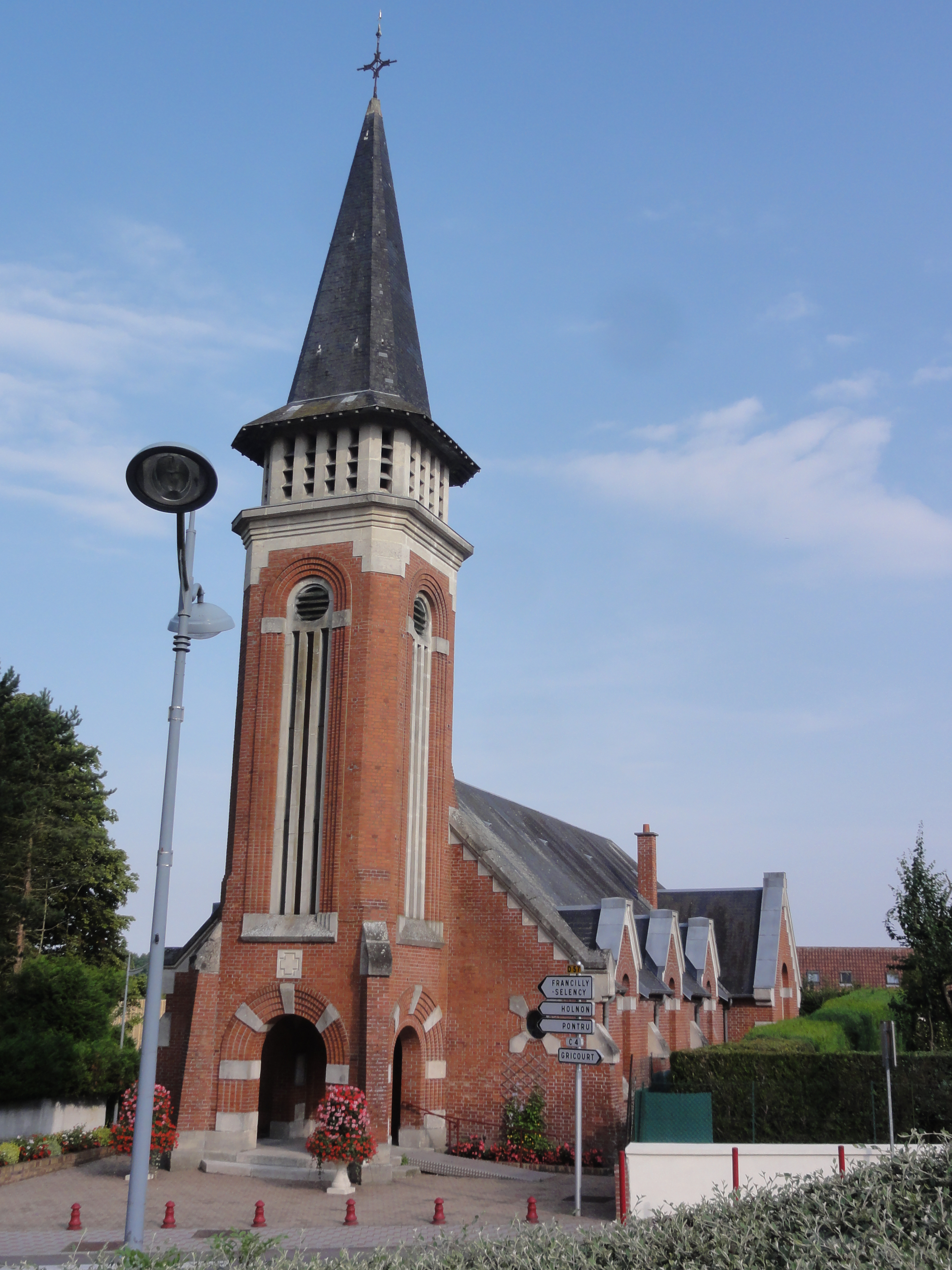 Fayet (Aisne) église